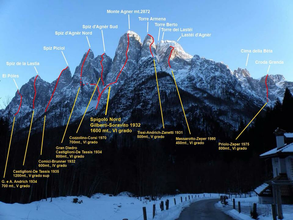 Le vie storiche più famose di ogni Cima sulla Parete Nord del Monte Agner